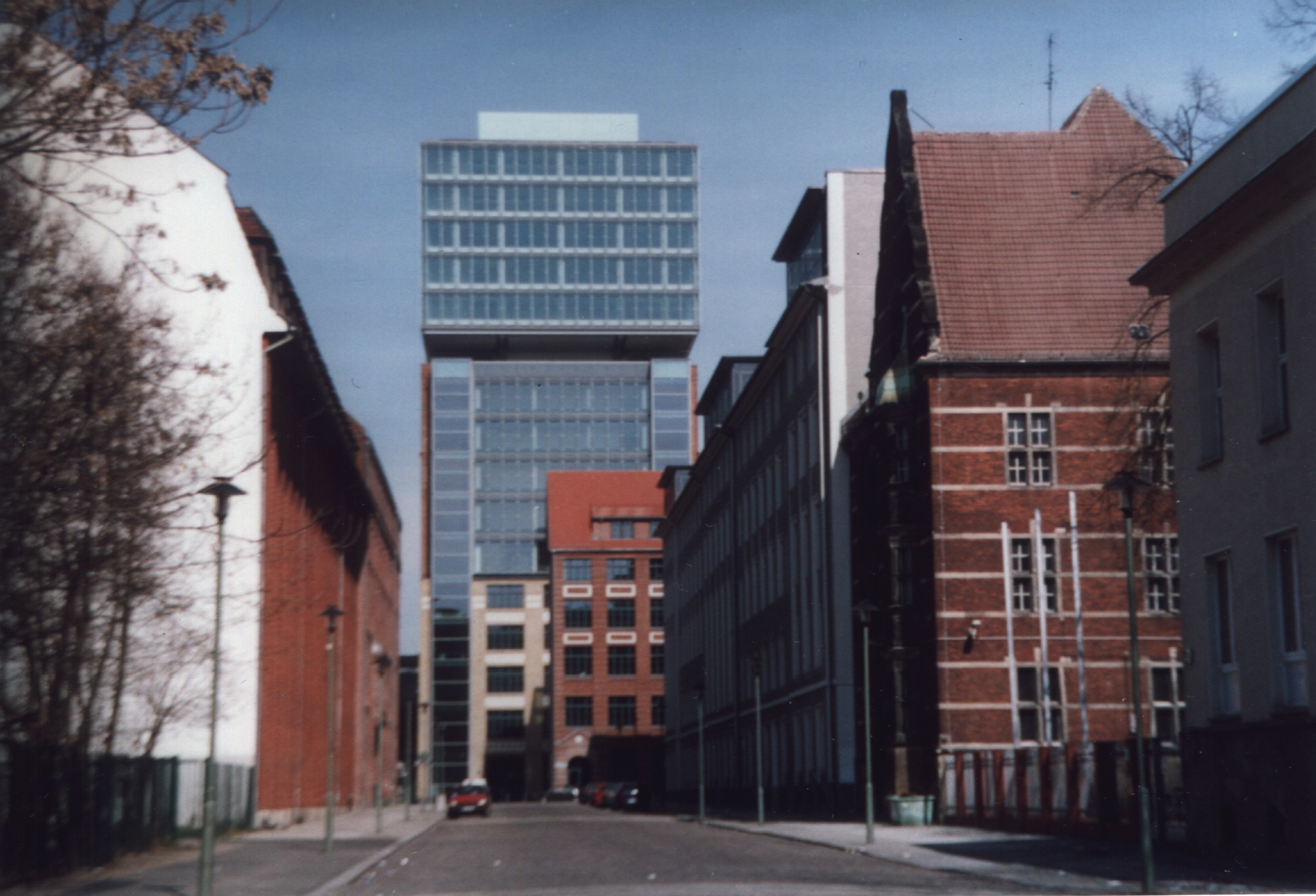 Gebäude der Oberbaum-City mit dem markanten Glasturm auf dem Produktionsgebäude